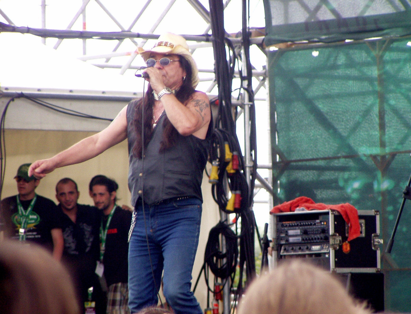 Pino Scotto all'Heineken Jammin' Festival 2007